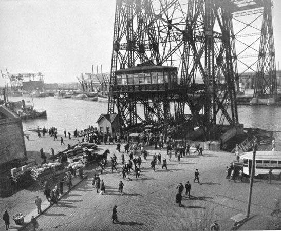 Transbordador Nicolás Avellaneda sobre el Riachuelo, al final de la Avenida Almirante Brown, barrio de La Boca.